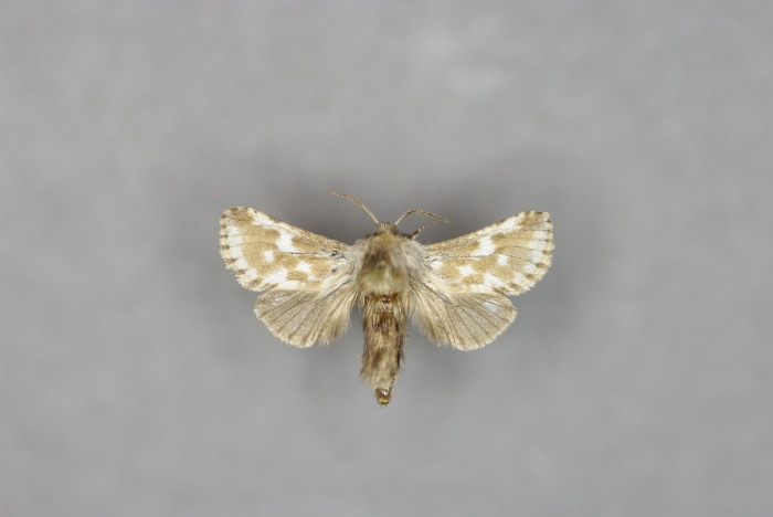 Dyspessa ulula, Männchen